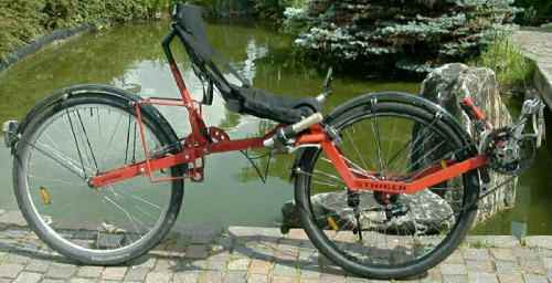 Autor: Steffen Heinz